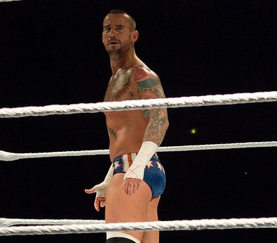 СМ Панк на хаус-шоу WWE